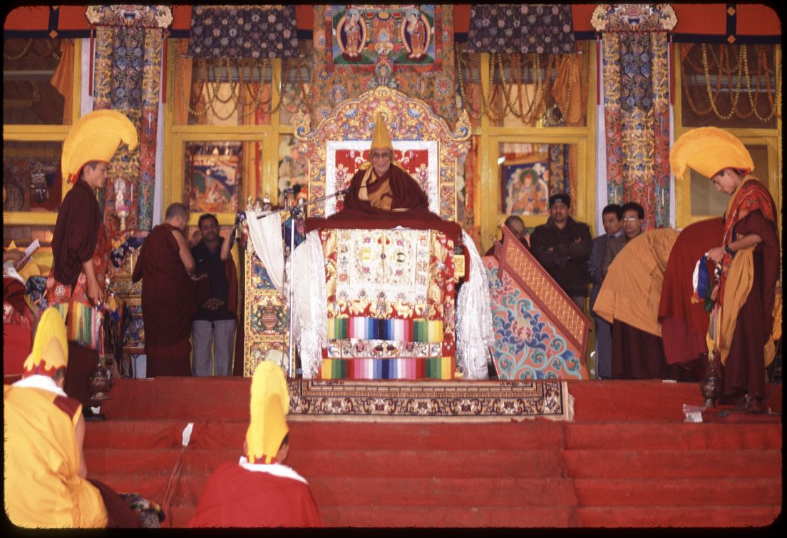 The Dalai Lama at the 2003 Kalachakra, Bodhgaya. By Joe Morris